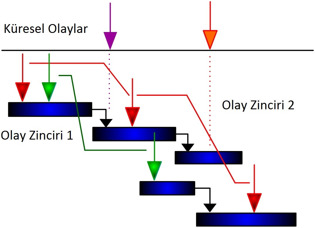 diyagram